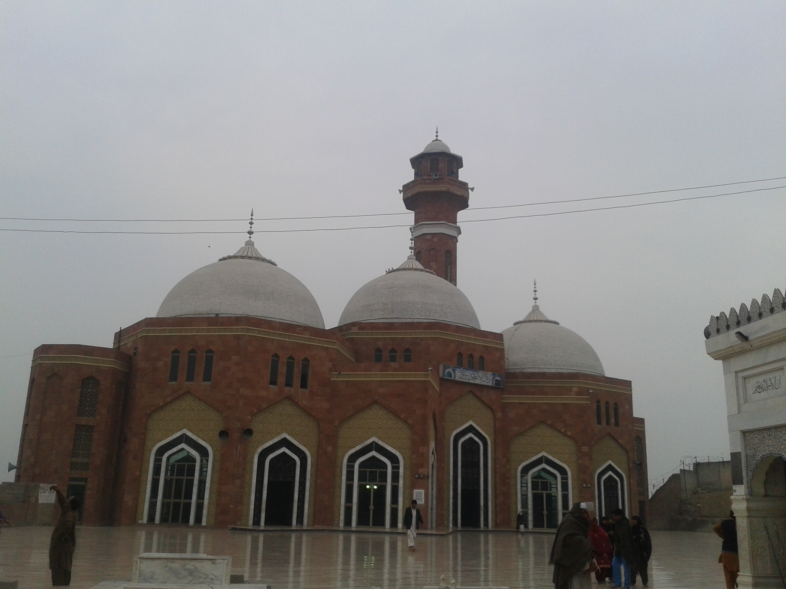 Mosque at Darbar Hazrat Baba Farid ud Deen Ganj Shakar Rahmatullah Alaih